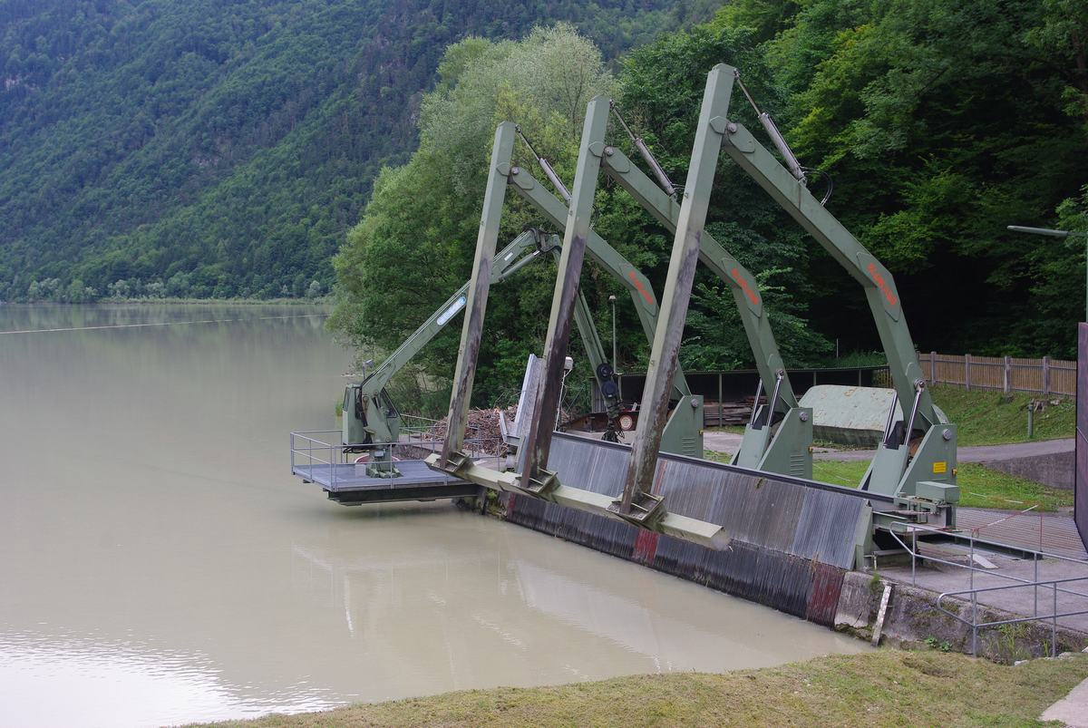 Einlaufbauwerk Saalachkraftwerk Bad Reichenhall am Saalachsee